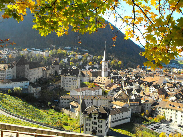 Chur from Arosastrasse